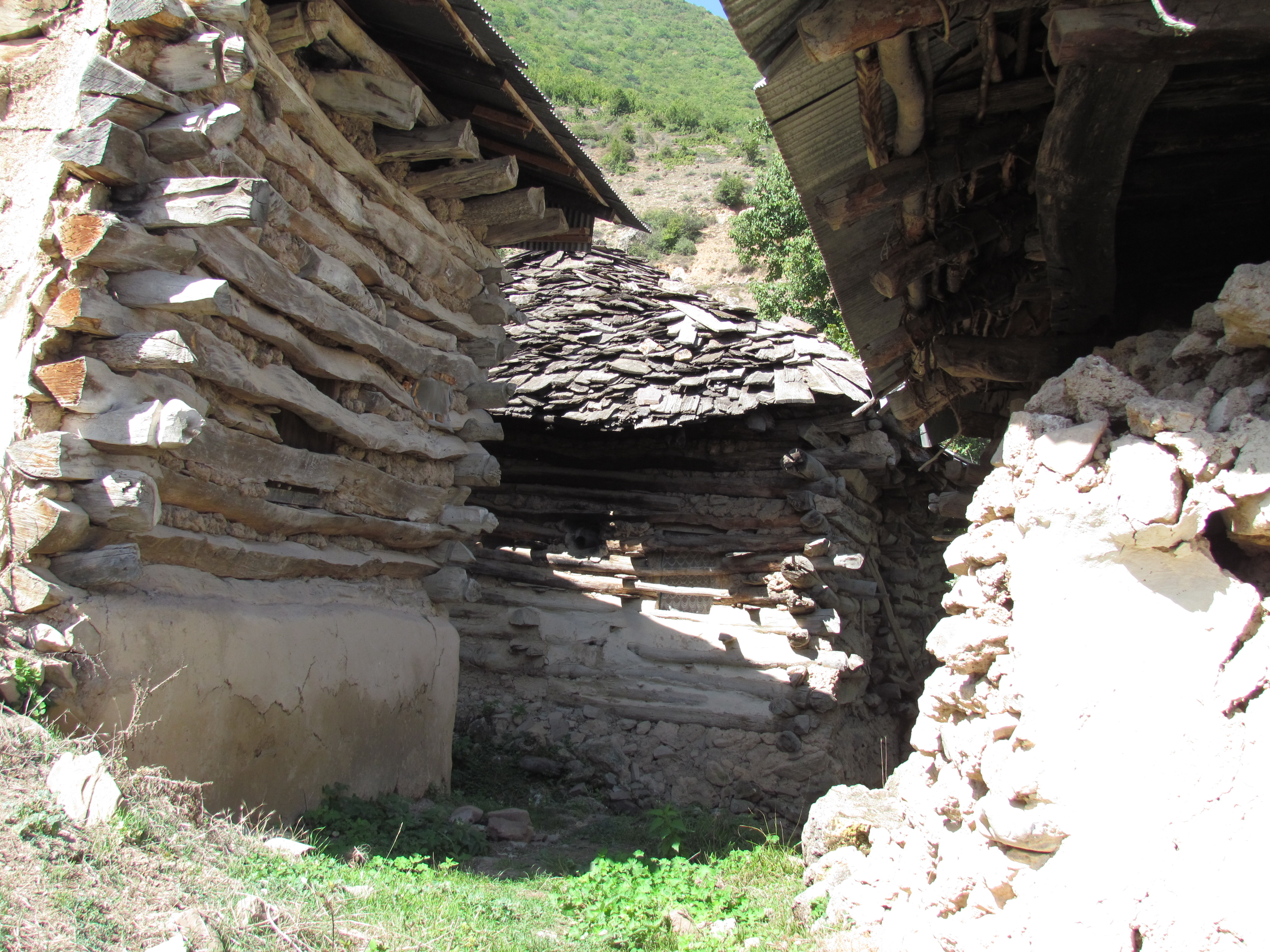 نمایی از کَلچو خنه